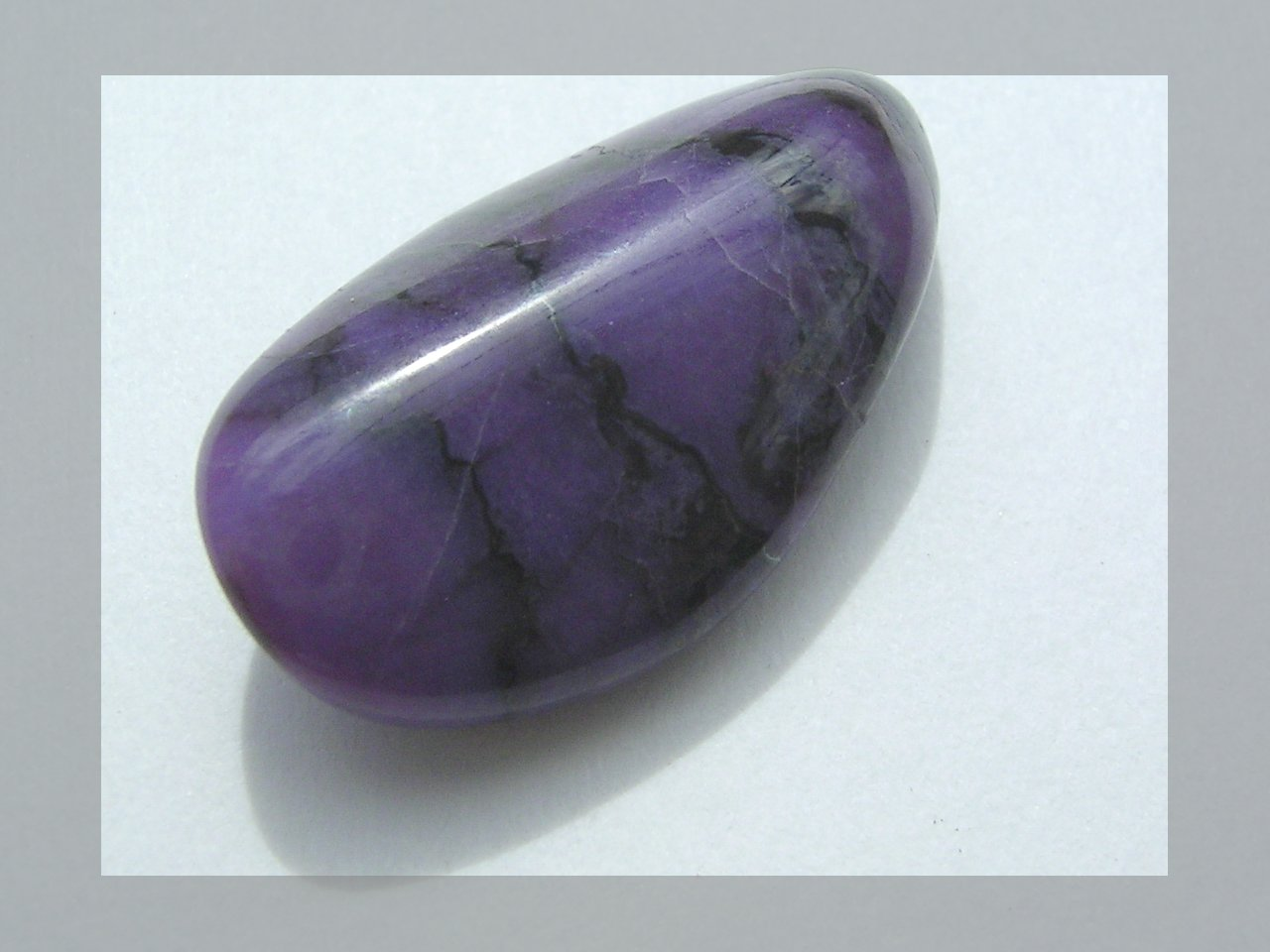 Geschliffener Sugilith